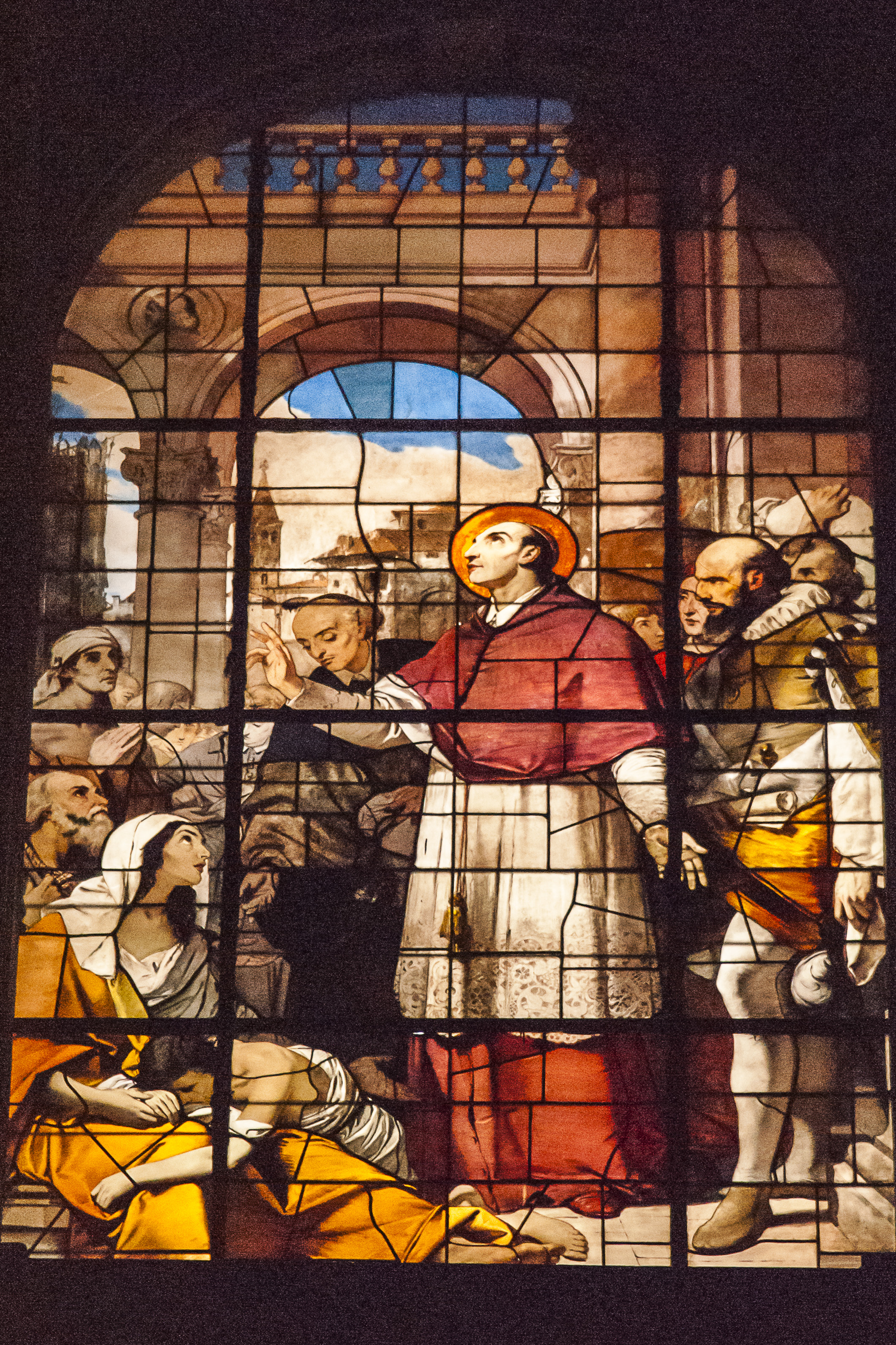 Wnętrze Katedry Duomo (Mediolan - Włochy)